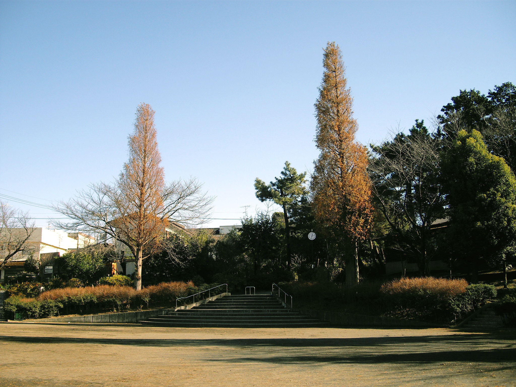 踊場公園